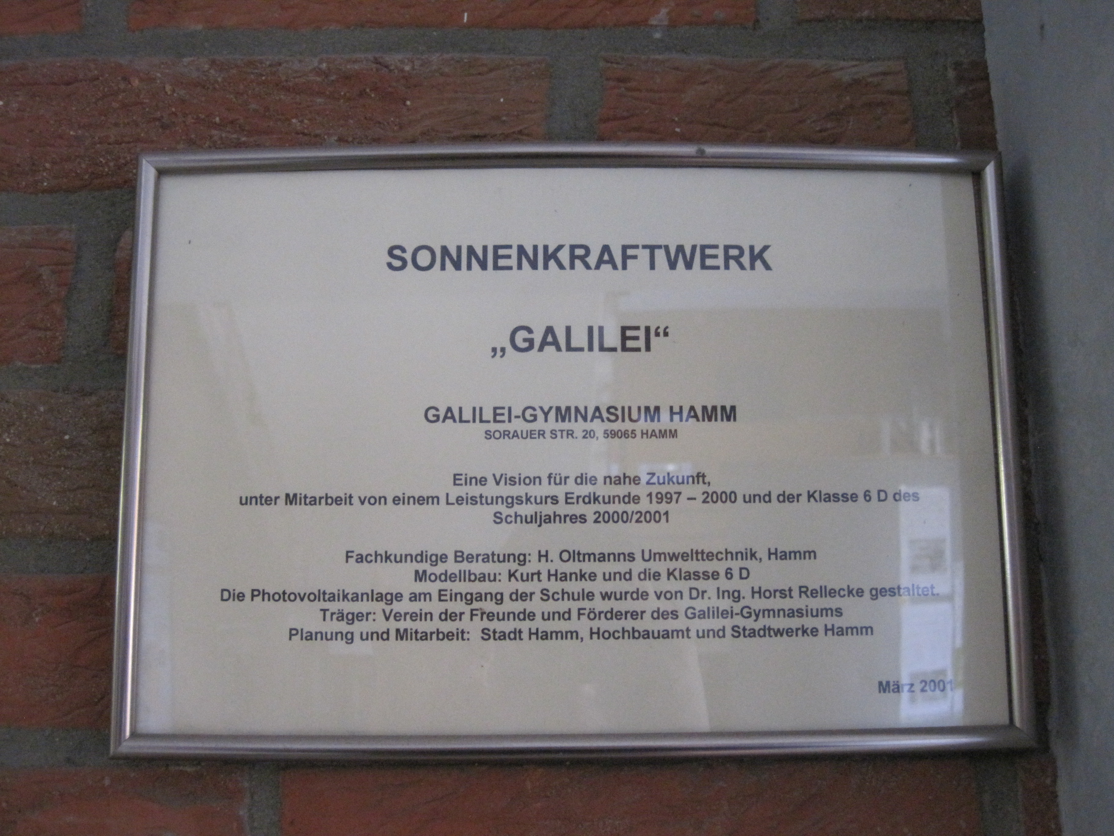 Das Foto zeigt eine Tafel im Eingangsbereich des Galilei-Gymnasiums Hamm.